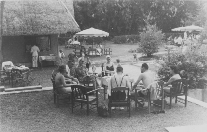 Foto. Op de achterzijde staat meermalen gedrukt: "Fotohuis Braga" D.E.N.I.S. Gebouw Bandoeng.. Badgasten zittend op stoelen in een halve kring naast het zwembad Dago te Bandung, Java